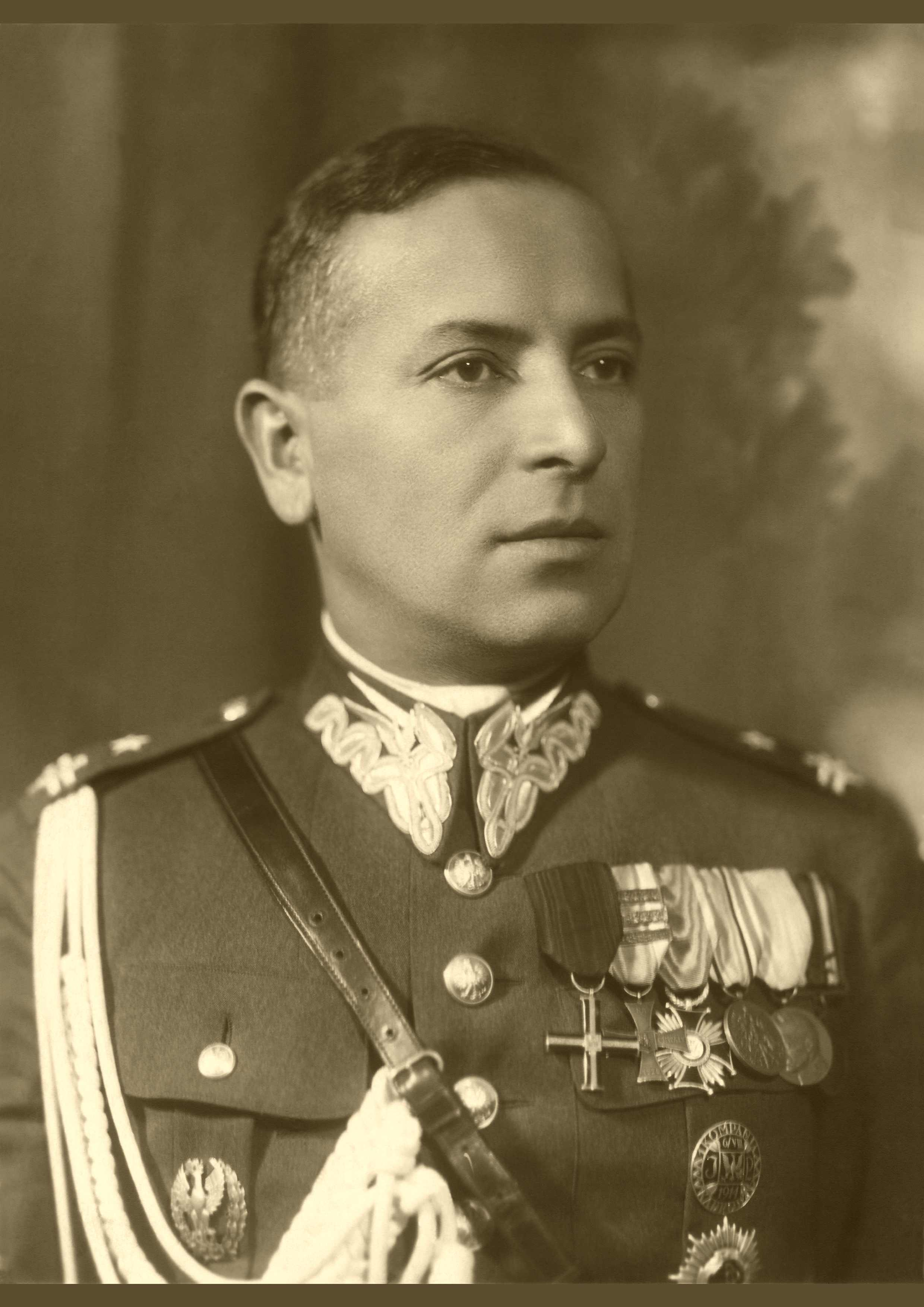 ppłk dypl. Zygmunt Platonoff-Plater